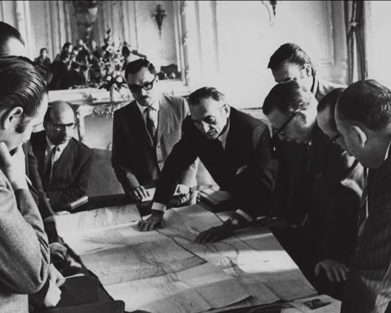 Salvador Allende junto con sus ministros de Interior y Obras Publicas revisando la construccion del camino Valparaiso - Viña